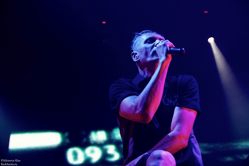 Билл Либ на выступлении Front Line Assembly в Москве, 2013 год.